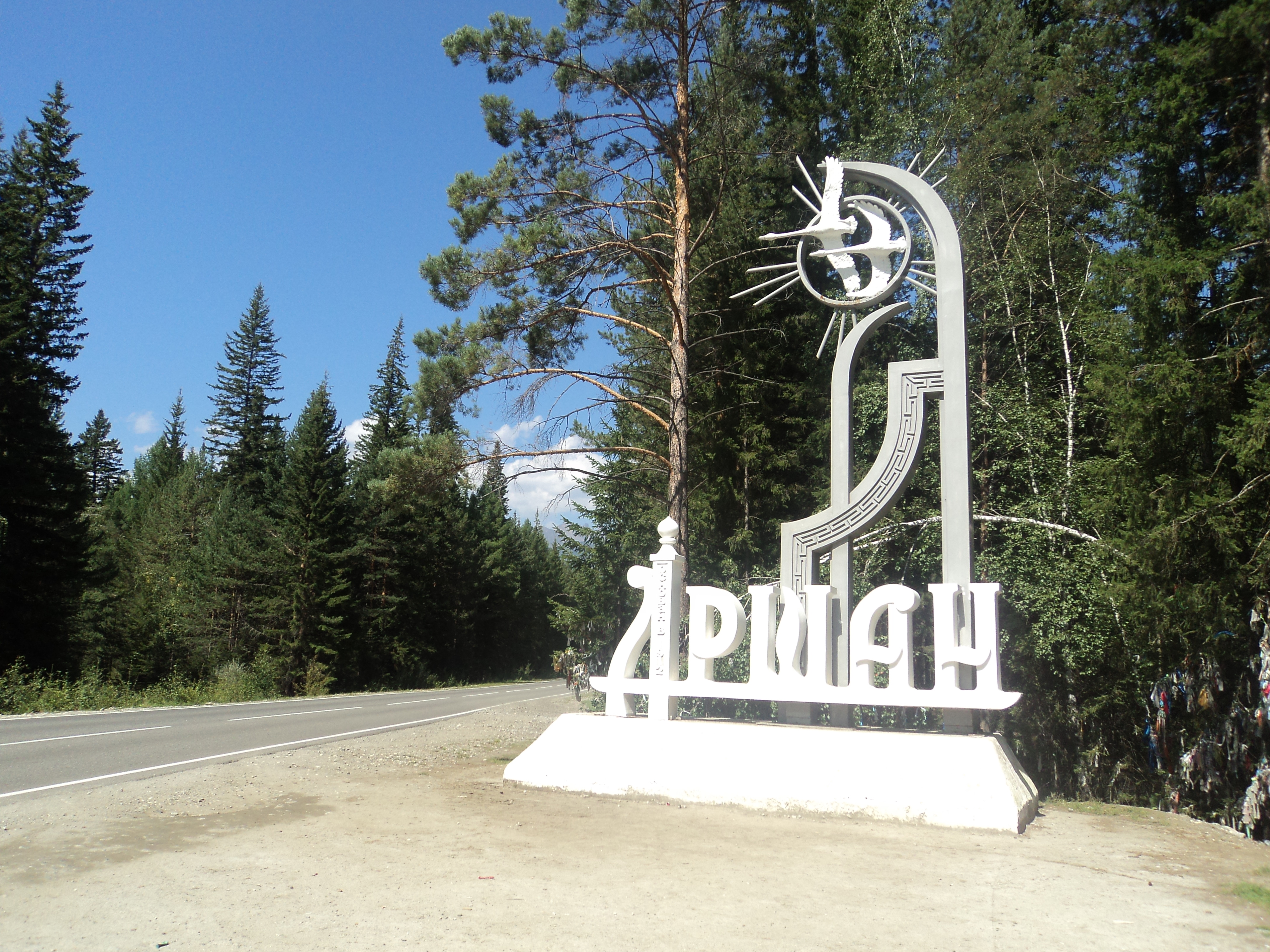 Аршан: Тункинский район, Бурятия This image is related to the protected area of Russia number 0310113